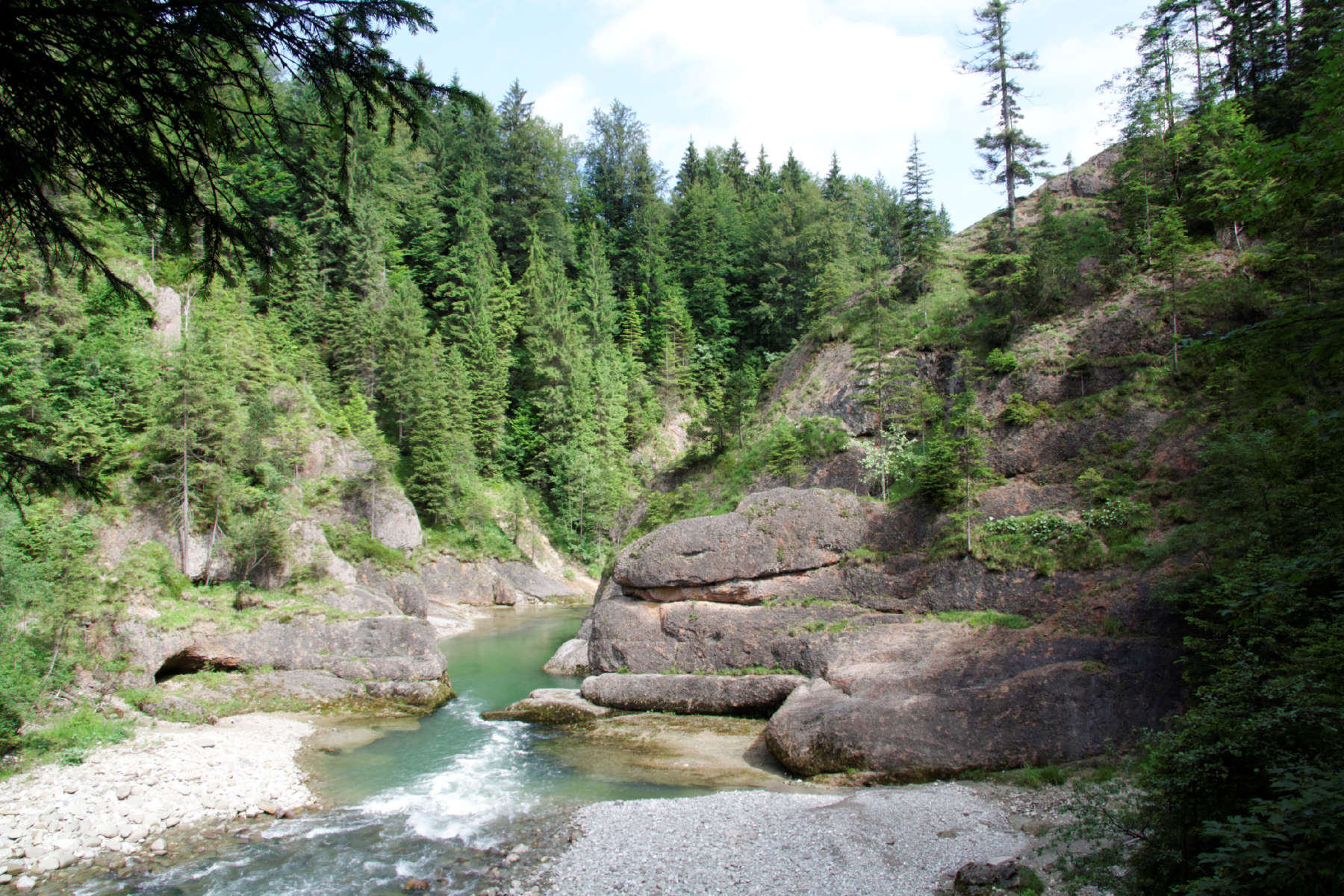 Saulgrub, Eintritt der Ammer in die Scheibum